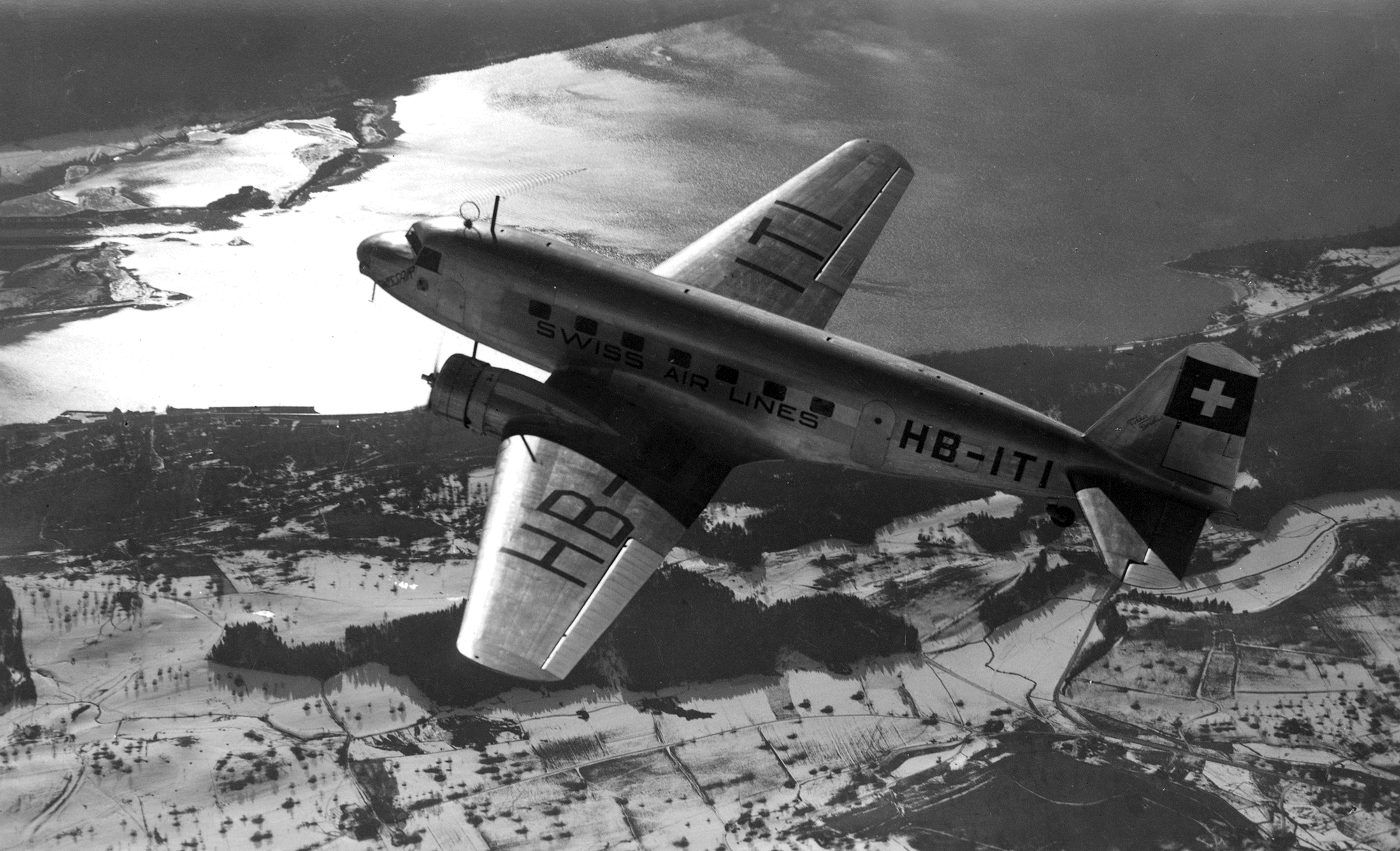 Mit 2 Motoren à 700 PS, Flug über Voralpen. Poststempel 22.06.1937. Von Febr. 1935 bis 28.2.1936 bei Swissair, am 28.2.1936 Bruchlandung bei Gfenn Dübendorf